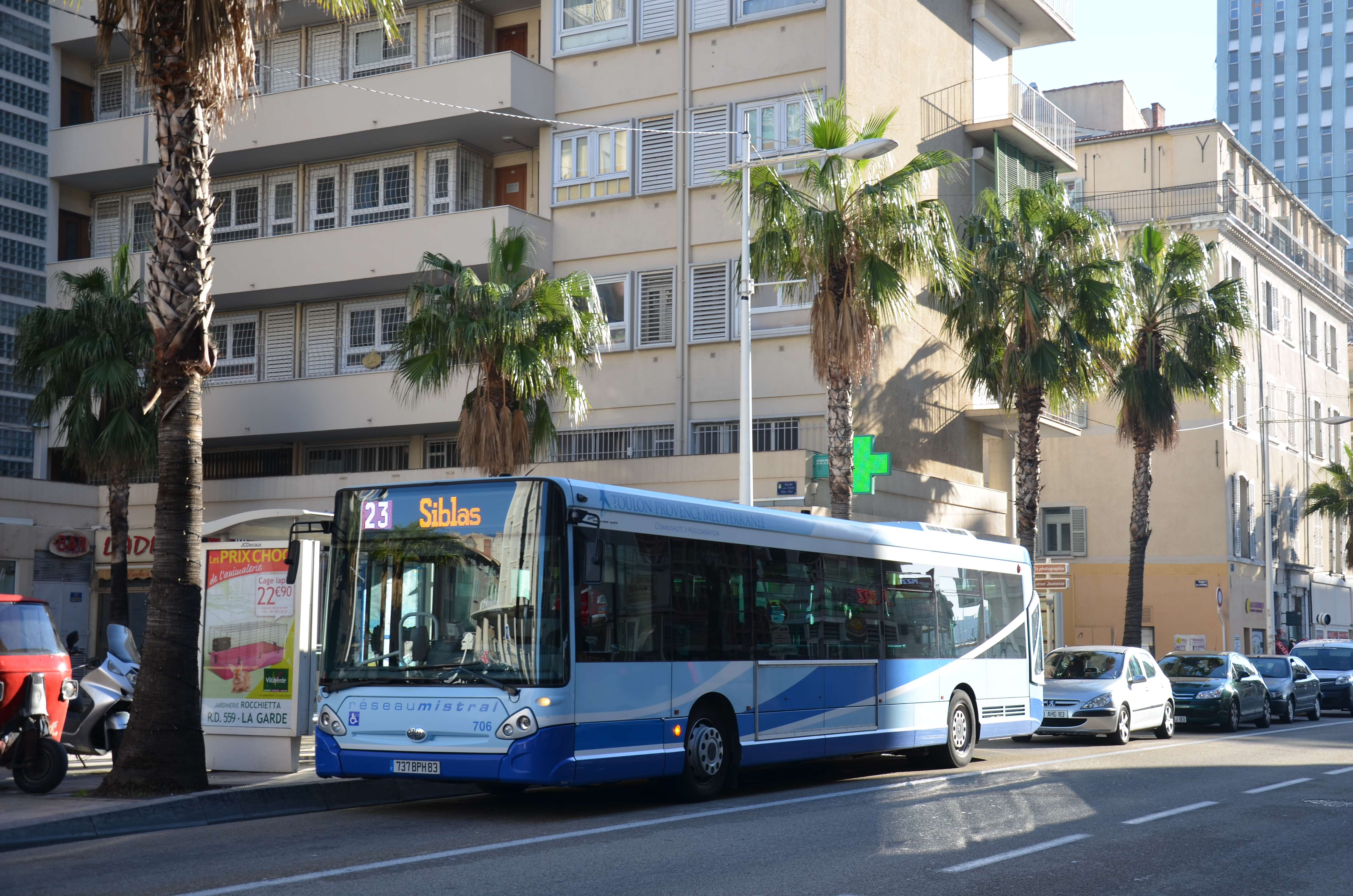 Heuliez GX 327 n°706 sur la ligne 28 du réseau Mistral de Toulon.